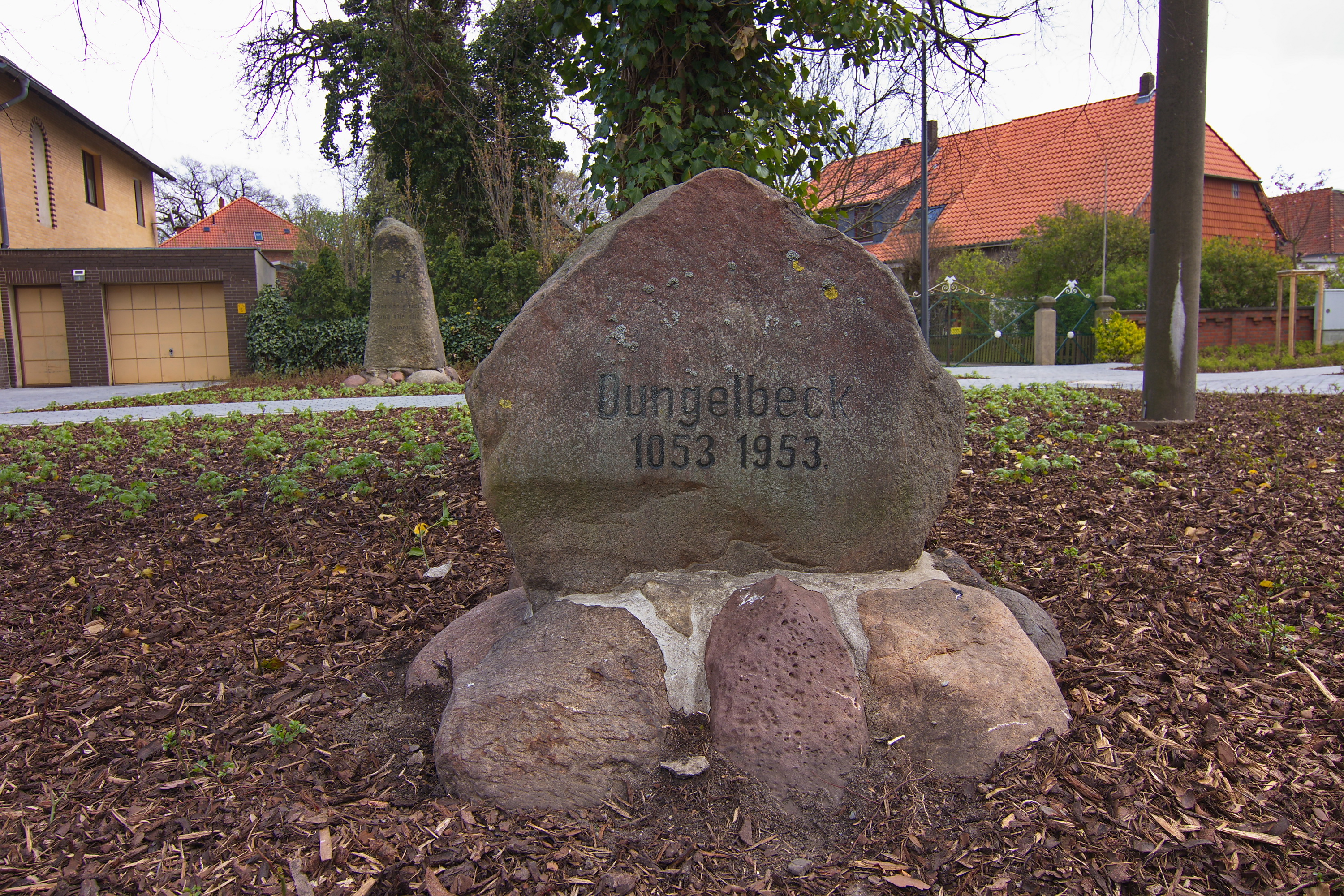 Gedenkstein in Dungelbeck (Peine), Niedersachsen, Deutschland.